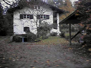 Haus der Familie Spoerl (Erben und Kinder von Alexander Spoerl und Heinrich Spoerl)